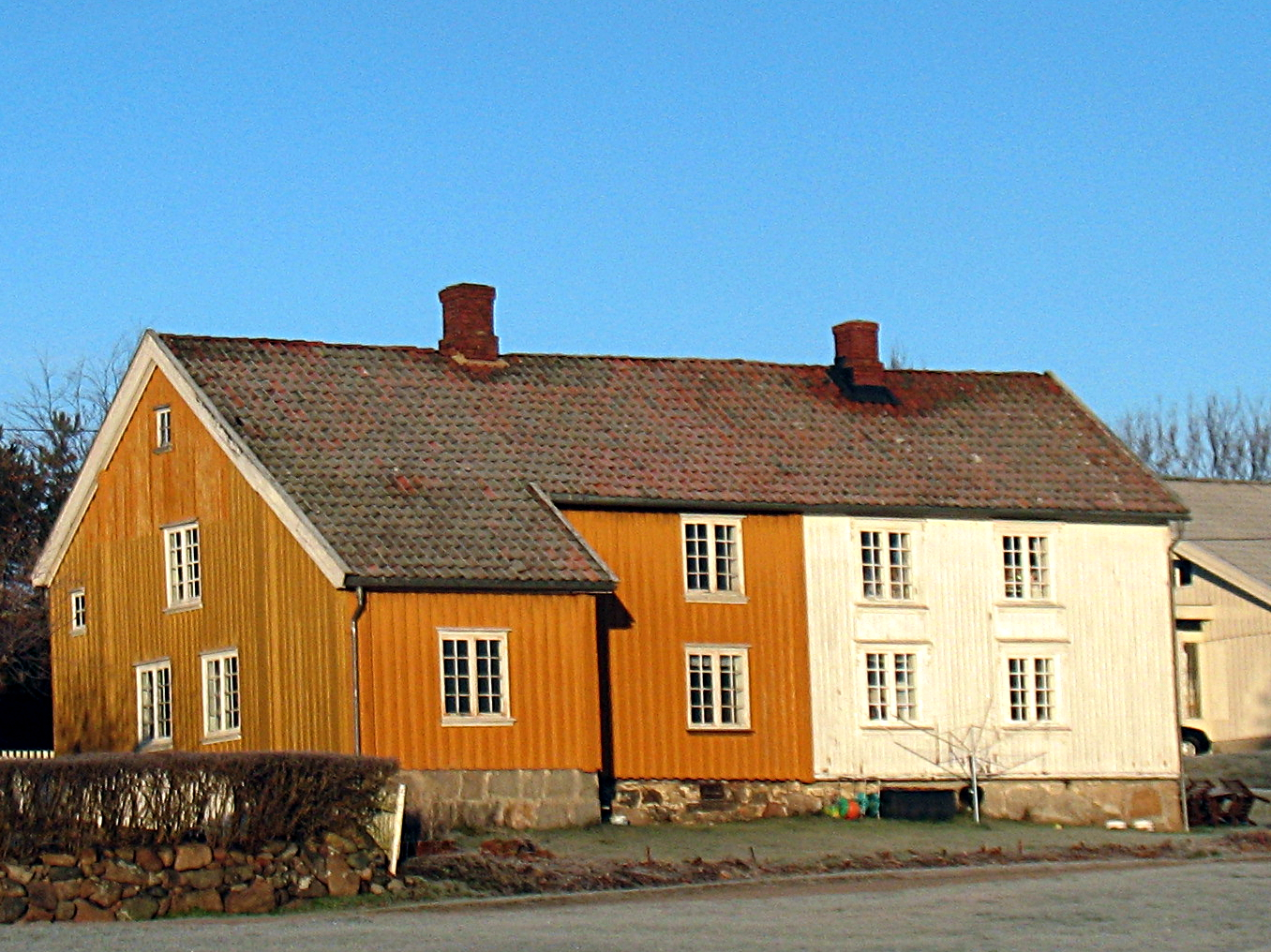 Museet Hans Nielsen Hauges minde på Hauge, Rolvsøy i Fredrikstad.